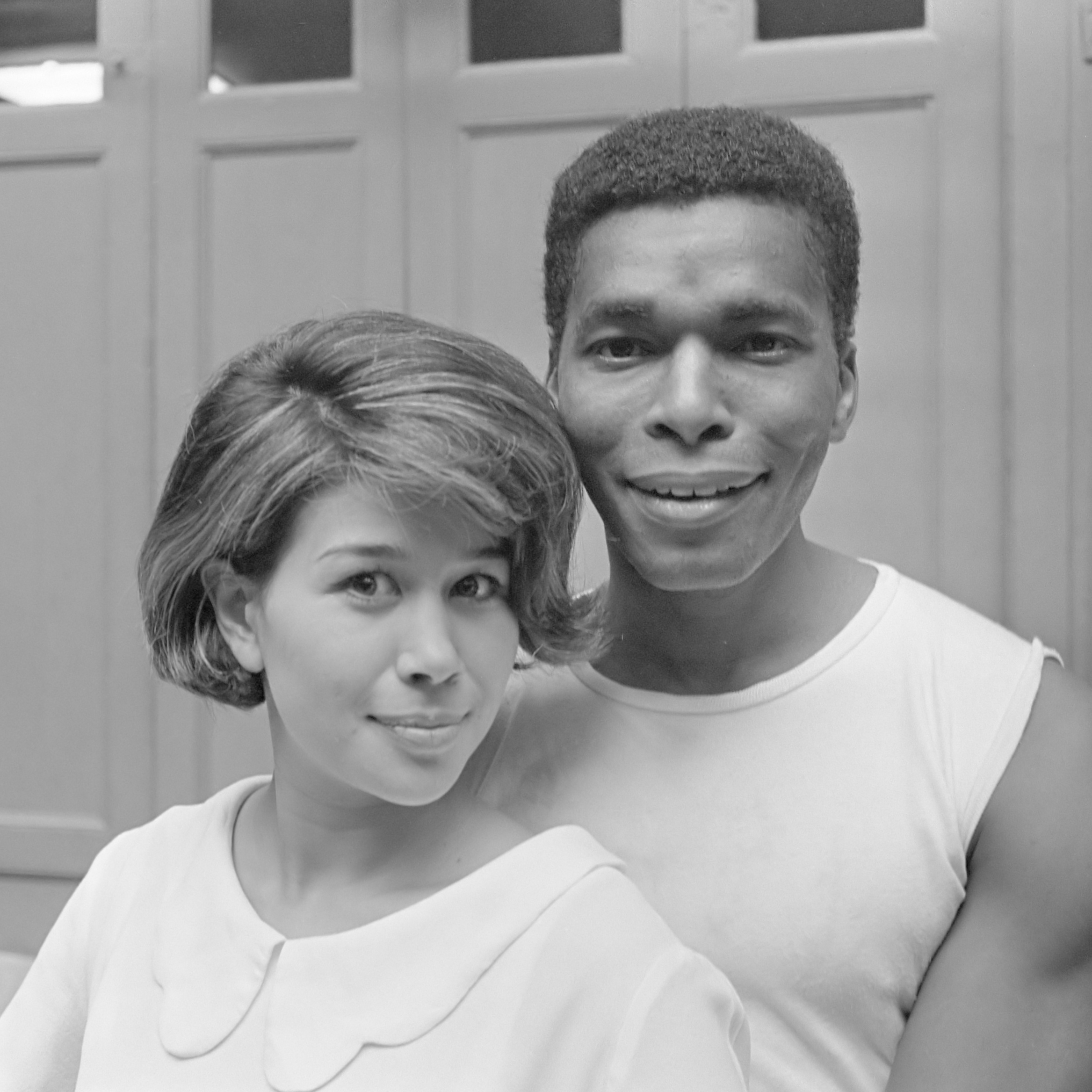 Anneke Gronloh in Snip en Snap Revue , Anneke Gronloh en Donald Jones (close-up) 18 juni 1965